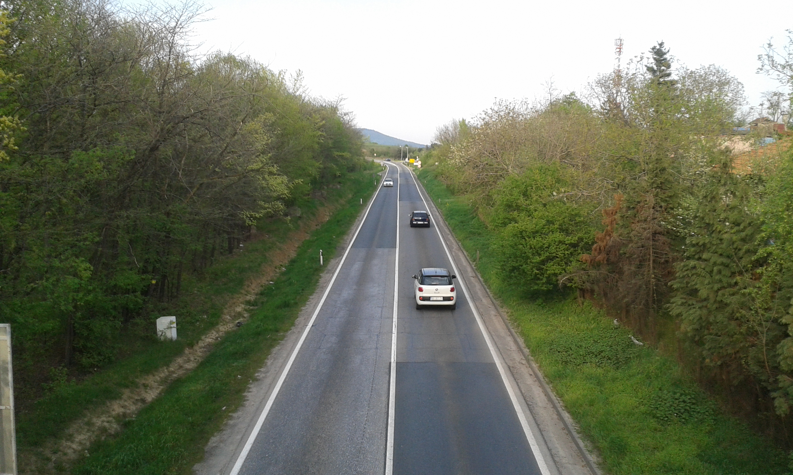 Deo Ibarske magistrale pri prolasku kroz Lipovicu.